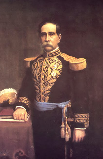 CORONEL JUSTO ARTEAGA CUEVAS Reveco, Demetrio (1862-1920) Oleo sobre Tela Pinacoteca Museo de la Escuela Militar , Santiago